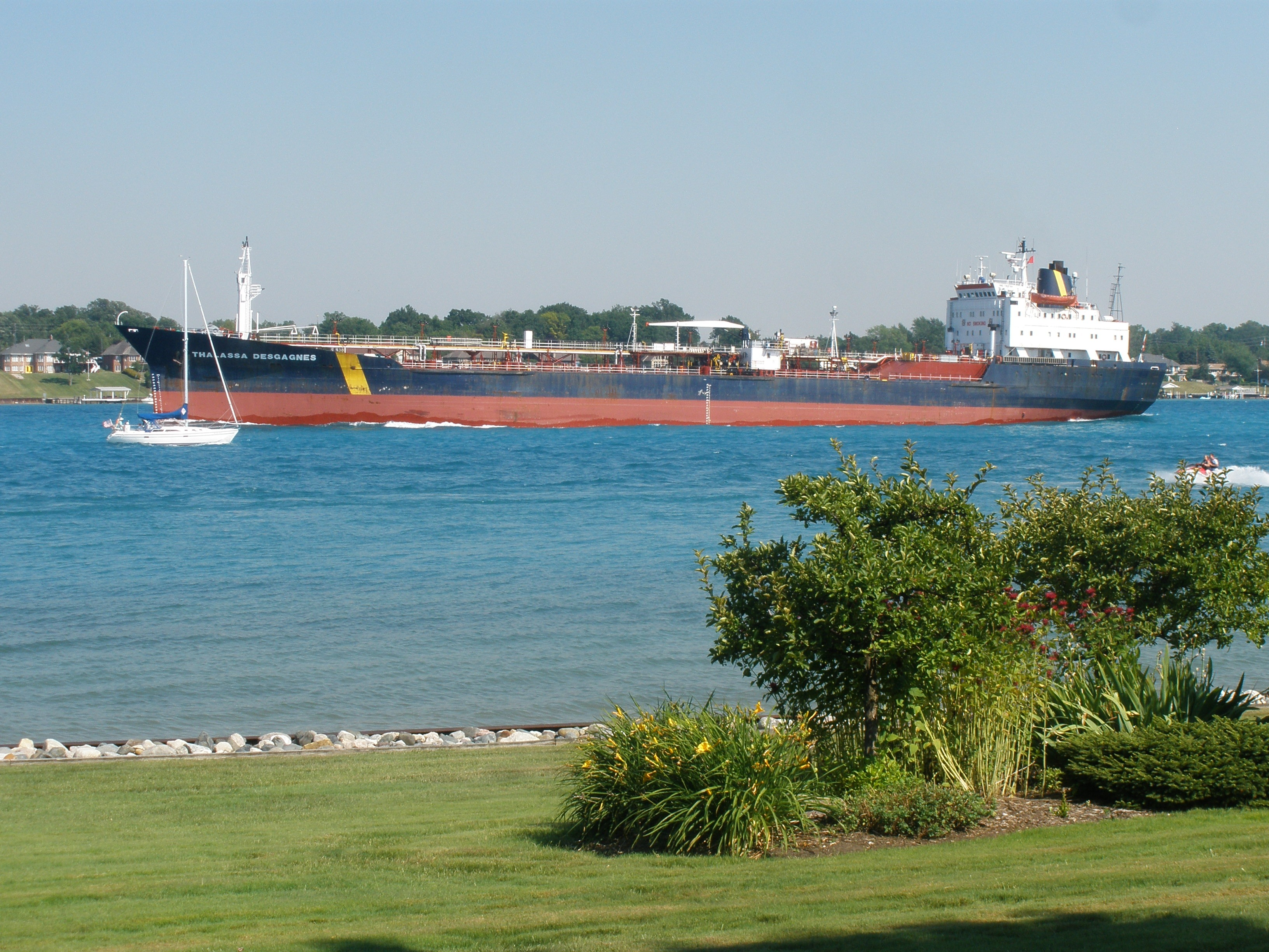 Freighter Thalassa Desgagnes